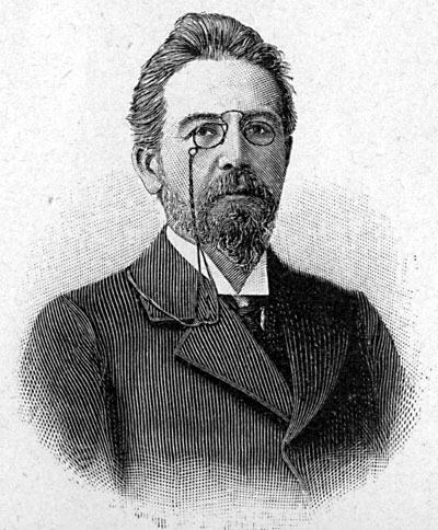 Anton Pawlowitsch Tschechow Original caption: :Anton Pawlowitsch Tschechow :Nach einer Photographie Source: "Bibliothek des allgemeinen und praktischen Wissens. Bd. 5" (1905), Abriß der Weltliteratur, Seite 85 Scan by User:Gabor